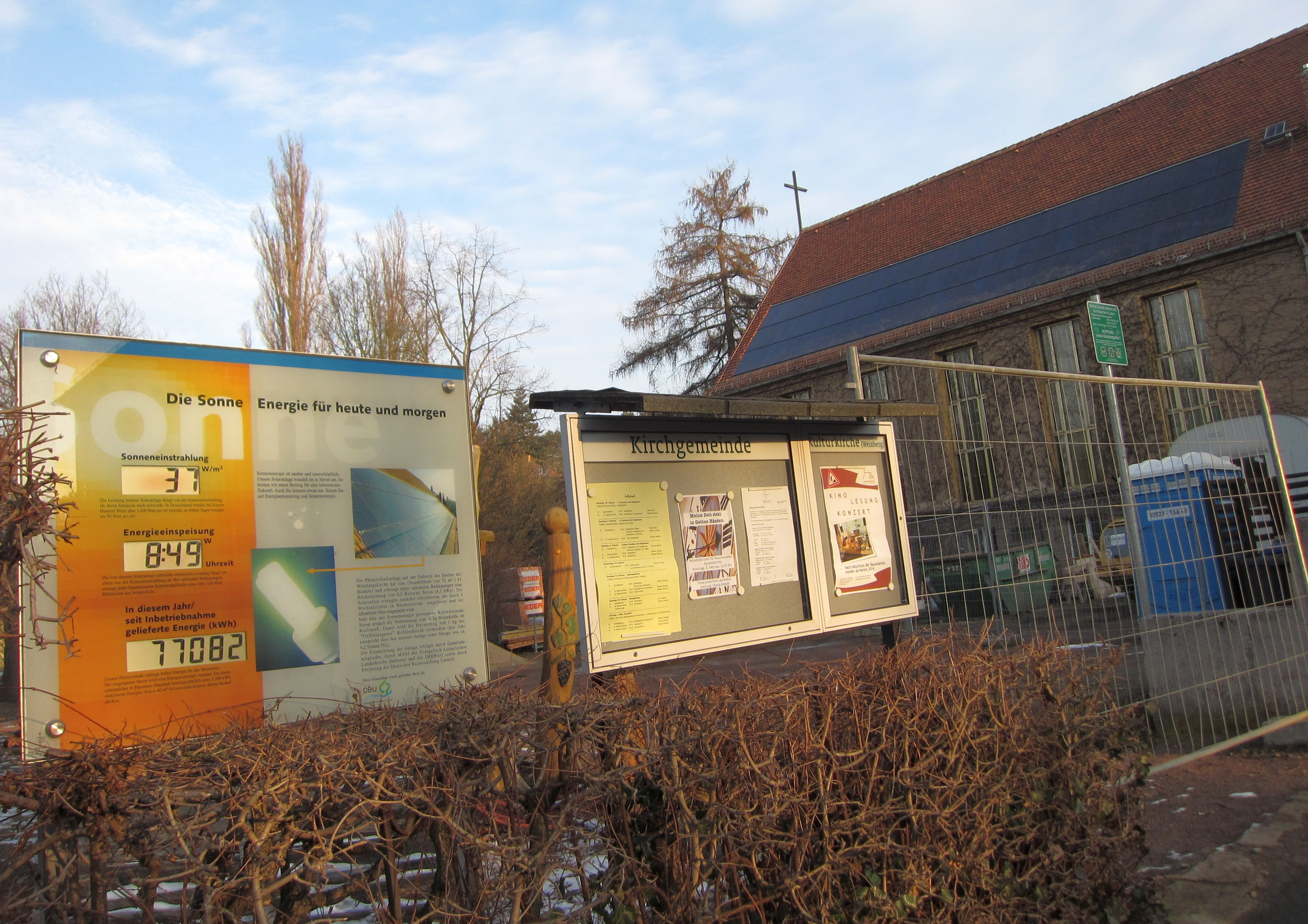 Weinbergskirche Dresden-Trachenberge, Informationstafel zur Solaranlage